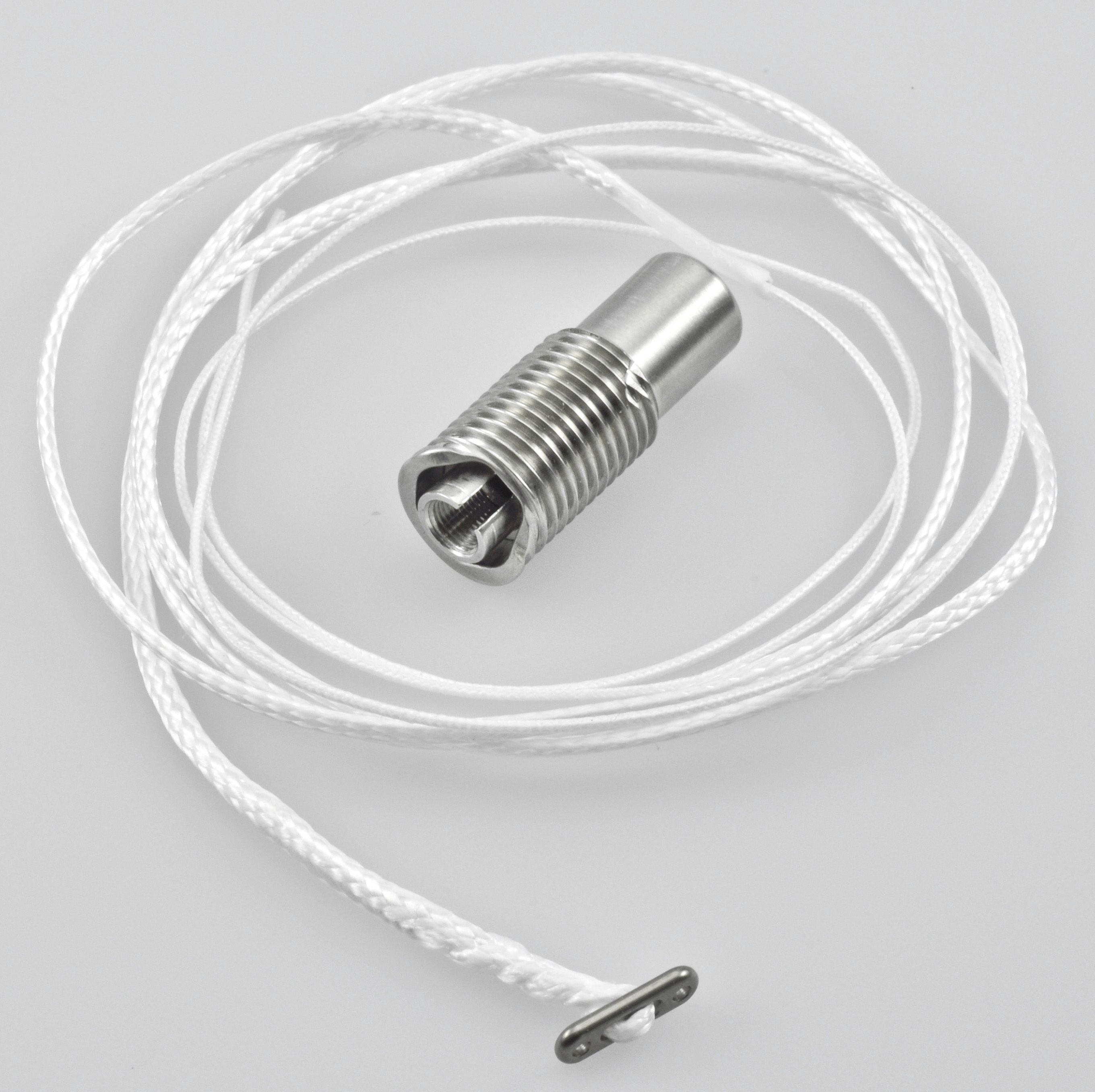 Ligamys Implantat (Schraubenfedersystem)